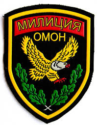 ВД РБ герб ОМОН